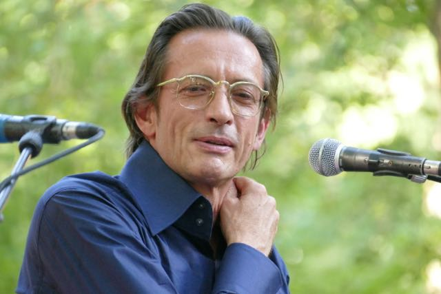 Oskar Roehler stellt auf dem Erlanger Poetenfest 2015 seinen Roman "Mein Leben als Affenarsch" vor.